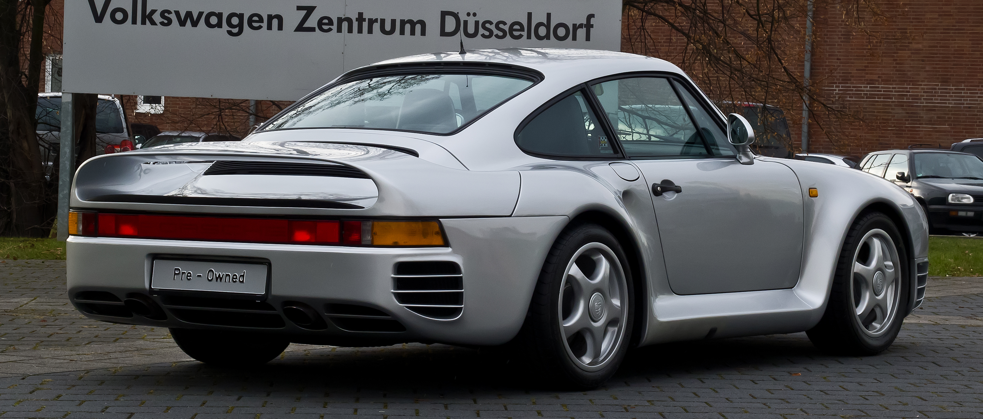 Heckansicht eines Porsche 959.